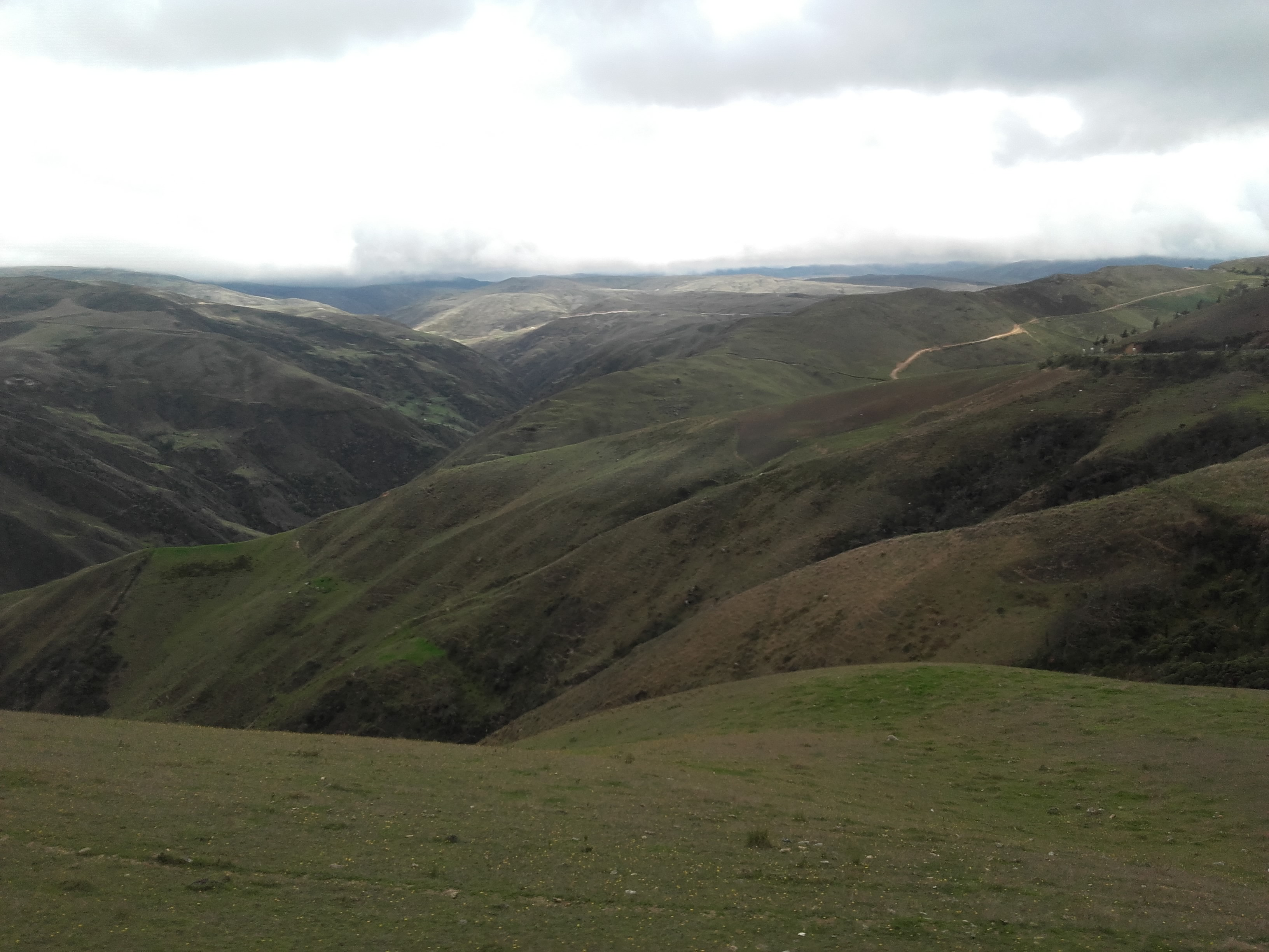 montañaañs